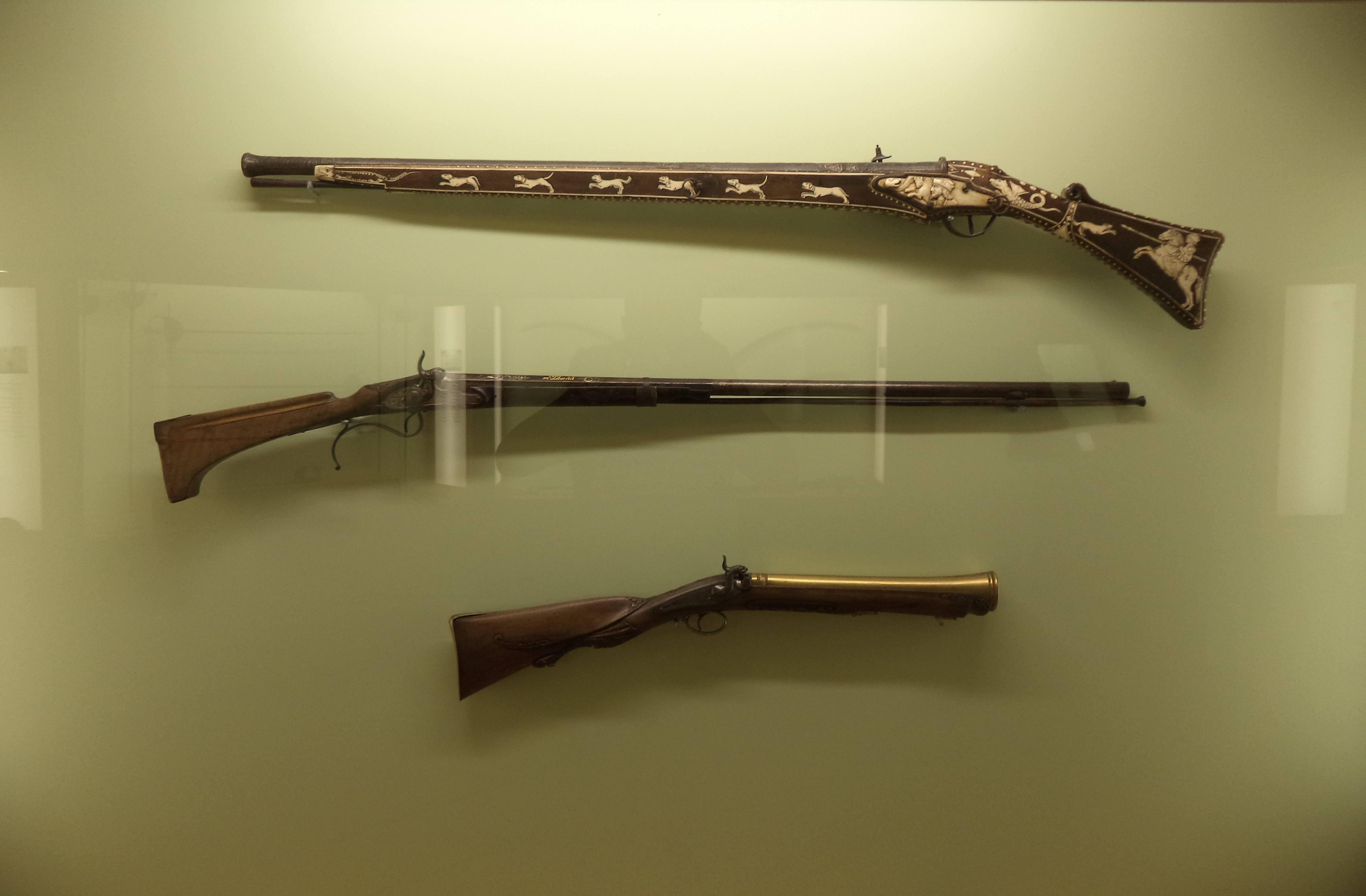 De arriba a abajo: 1º Arcabuz de rueda con cañón damasquinado adornado con arabescos en plata. La caja presenta incrustaciones en hueso con figuras de personas y animales. Siglo XVII. Madera, hierro, acero, plata y hueso. Llave y caja europeas (probablemente alemanas), cañón y guarnición con características turcas 2º Escopeta de pistón con llave delantera transformada de sílex, el cañón es retorcido de herradura con adornos de plata embutida. 1828. Acero, madera, plata oro. Marca del armero Antonio Guisasola, Eibar, Guipúzcoa. 3º Trabuco con llave de pistón trasera, cuyo percutor tiene forma de animal, hacia 1820. Acero, madera, latón, plata. Bélgica. Museo de Artes y Costumbres de Sevilla